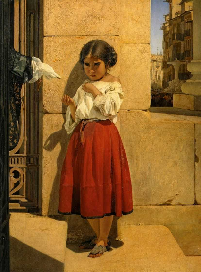 Сорокин Евграф Семенович. Нищая девочка-испанка. 1852